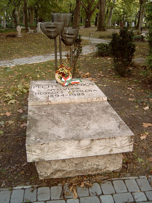 Péchy Blanka, Greiner, Pécsi (Pécs, 1894. szept. 21. – Bp., 1988. júl. 6.): színésznő, előadóművész, író sírja Budapesten. Kerepesi temető: 42/1-A-14.